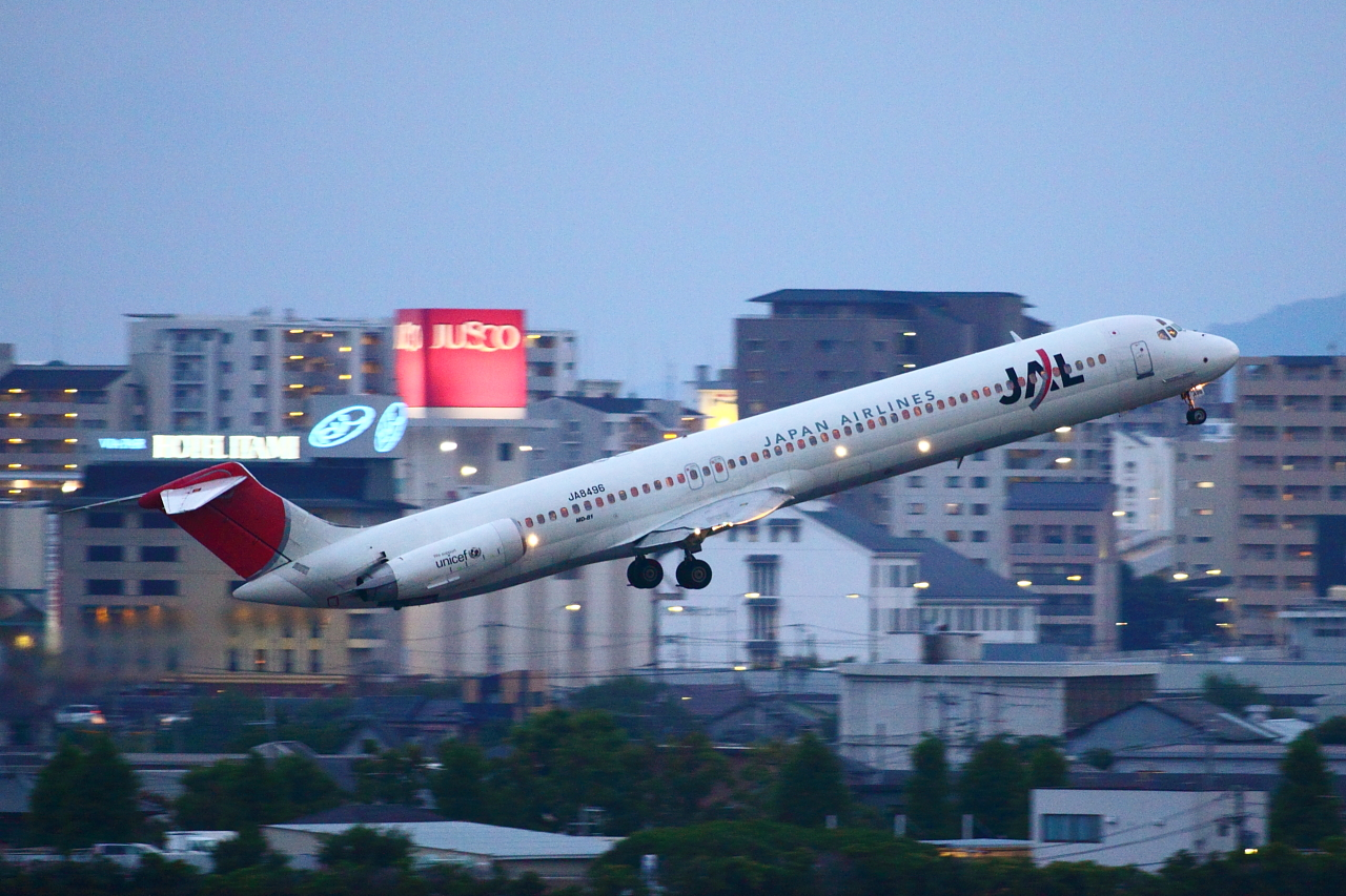 日本航空・MD-81(JA8496)